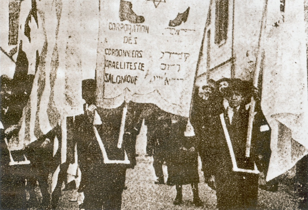 צעדת ה-אחד במאי של גילדת הסנדלרים היהודיים של סלוניקי, 1909.